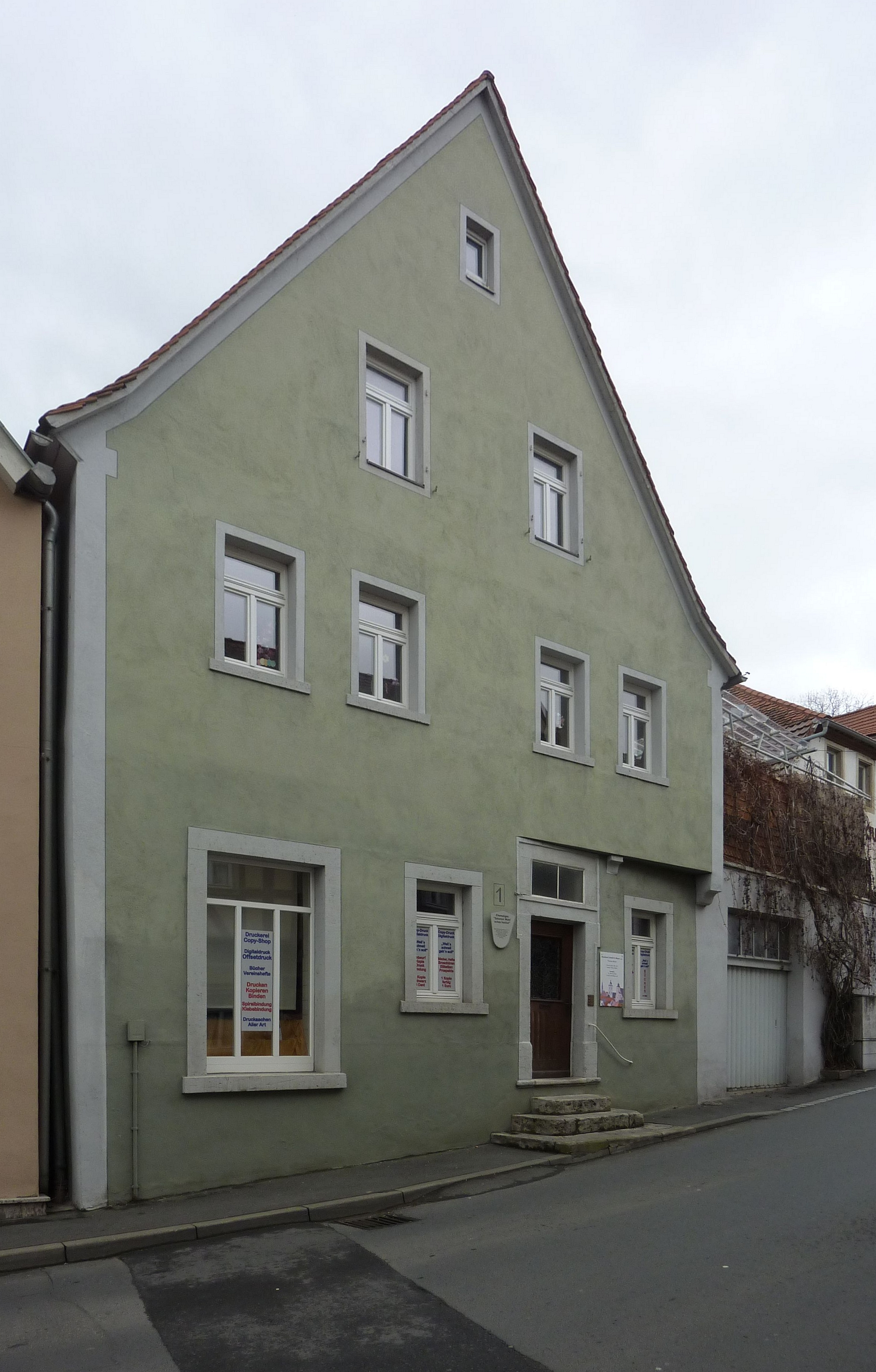 ehemaliges Salomon Wohl'sches Institut in Marktbreit